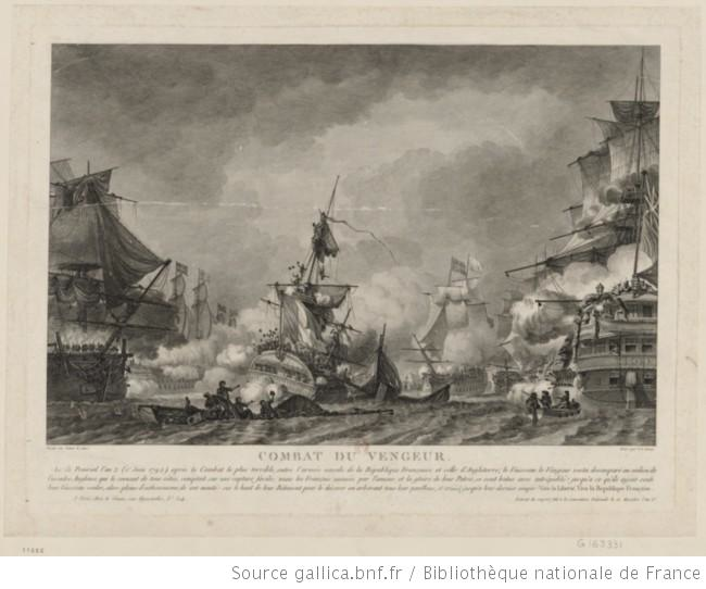 Combat du navire Le Vengeur, gravure par Yves Marie Le Gouaz, (1742-1816), 1800 d'après modèle par Nicolas-Marie Ozanne (1728-1811). Edité chez Le Gouaz, Paris, 1800)